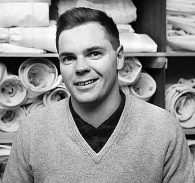 Hans Fogh